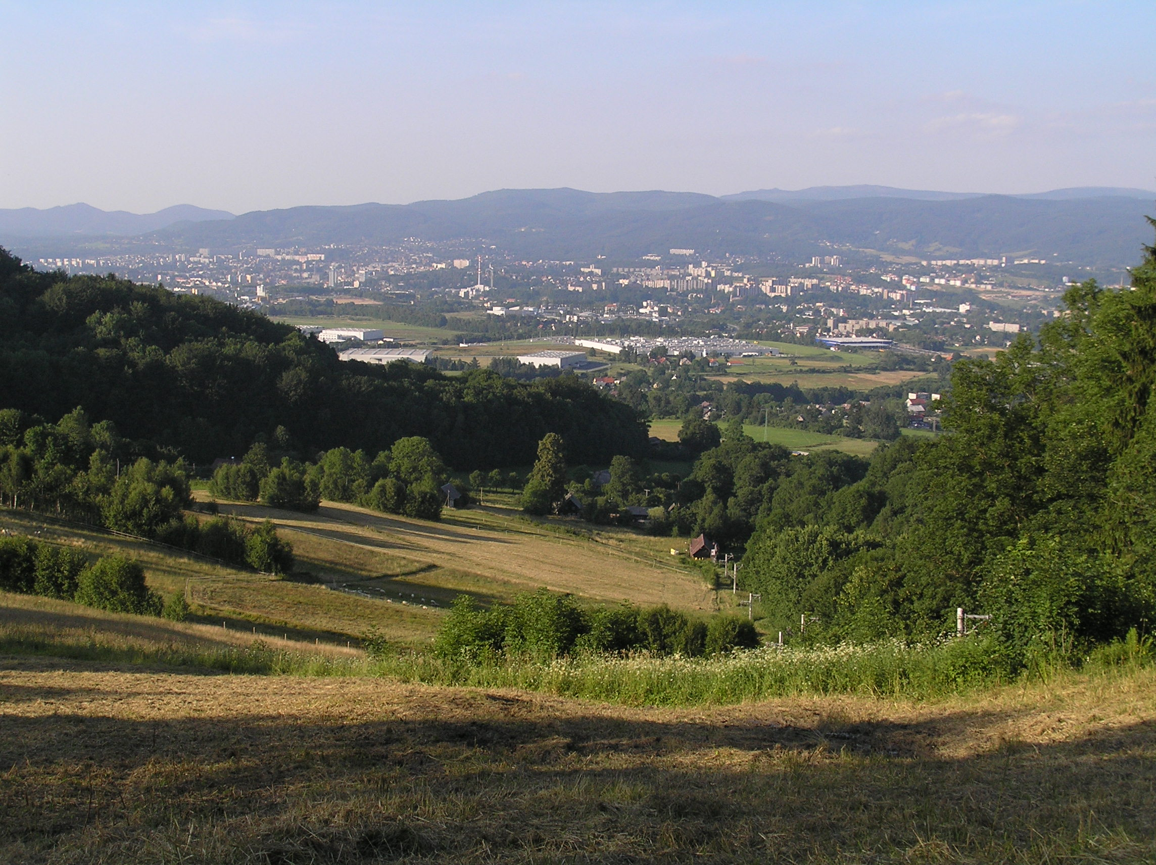 osada Hluboká (Lubokei), dnes čtvrť Liberce